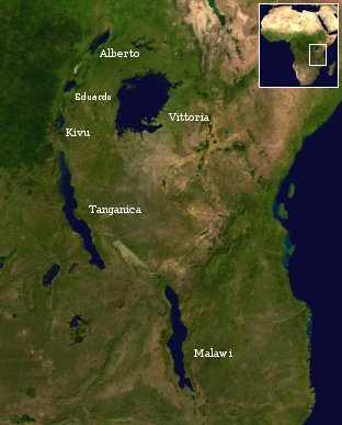 Immagine fatta da me modificando l'immagine dell'Africa che si vede nel riquadro, che è di pubblico dominio.